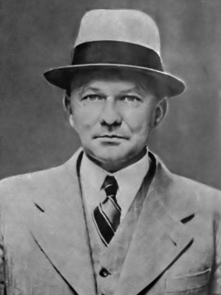 Dr. H. .Wohlthat, economisch commissaris aan de Nederlandsche Bank toegewezen 1940